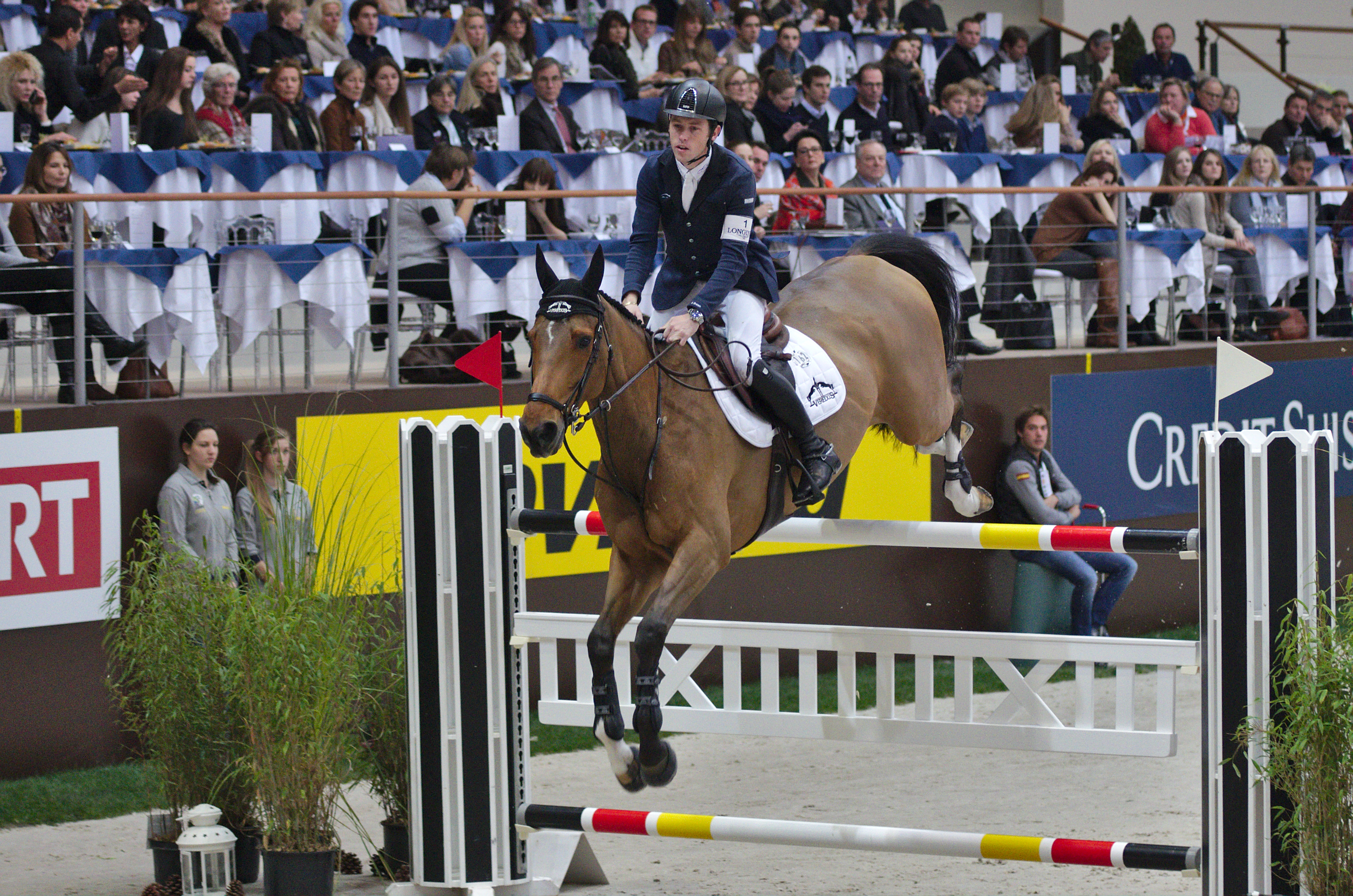 54eme CHI de Genève - 20141212 - Scott Brash et Hello Sanctos